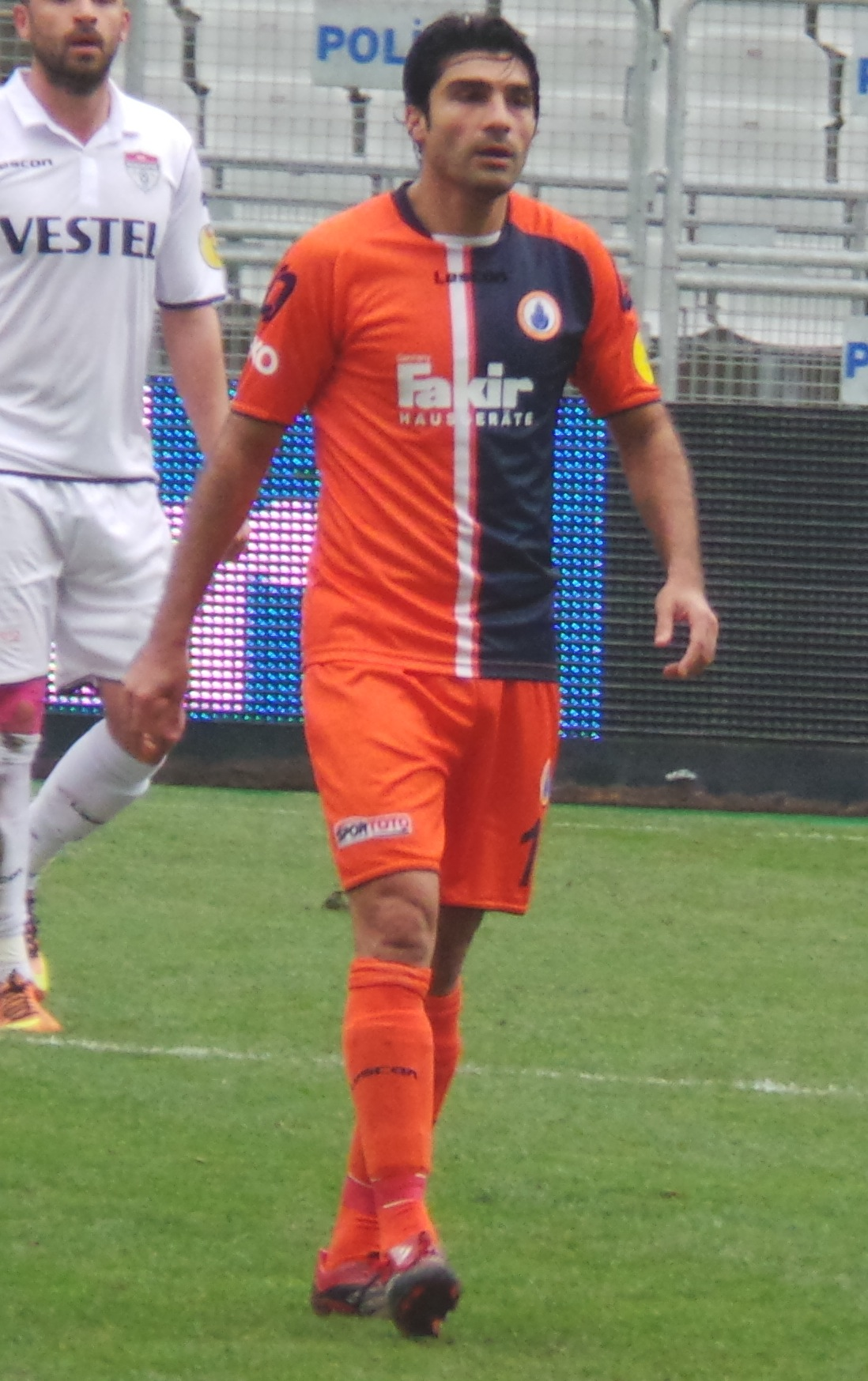 Mustafa Sarp'14